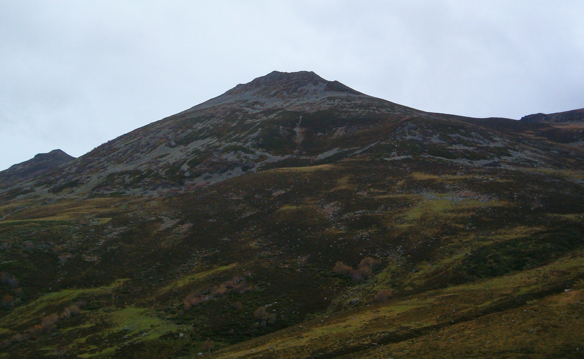 Cuetu Iján desde la cabaña de Cuadragú (Sejos). Cordillera Cantábrica